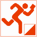 סמל ניווט רגלי